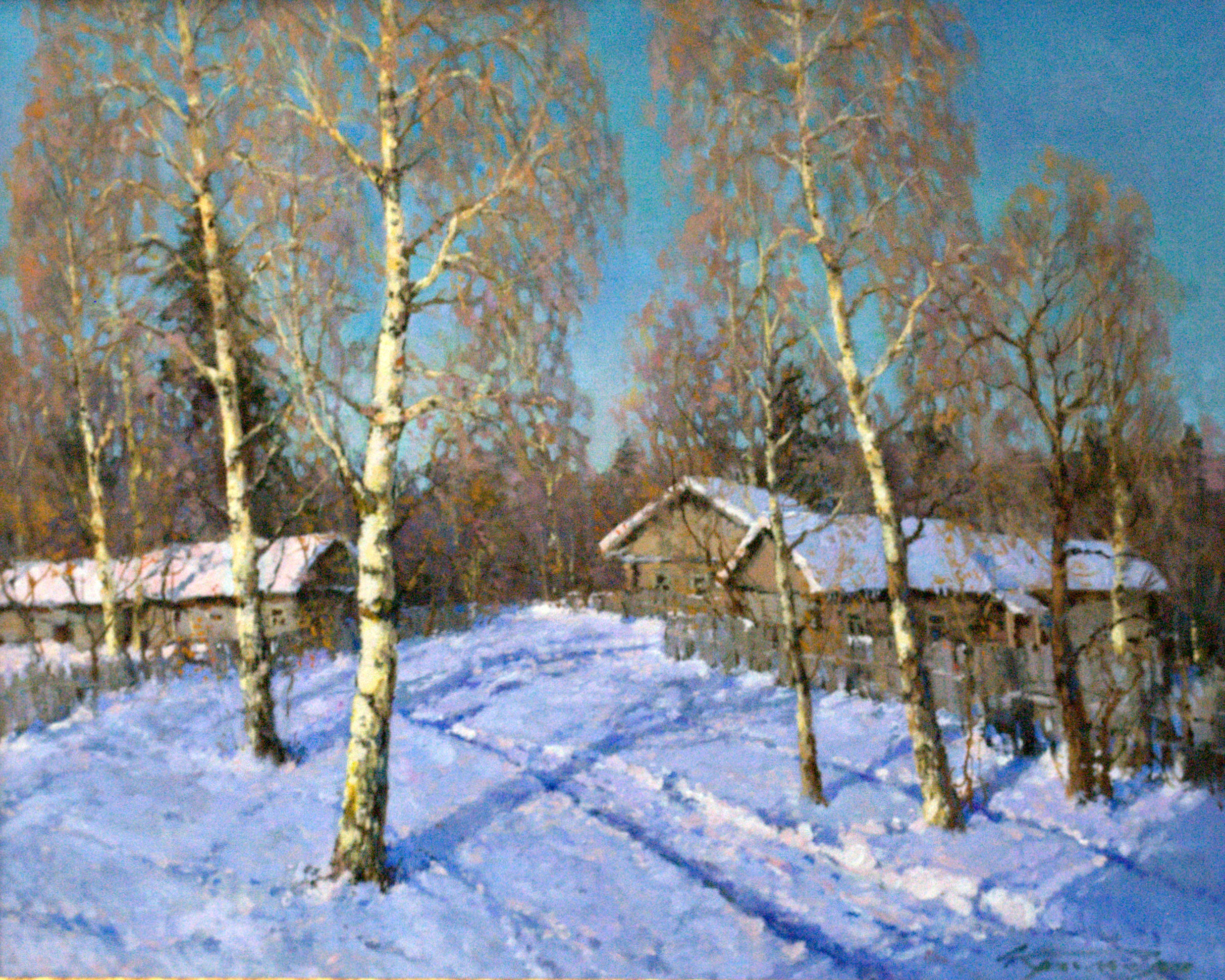 Февраль